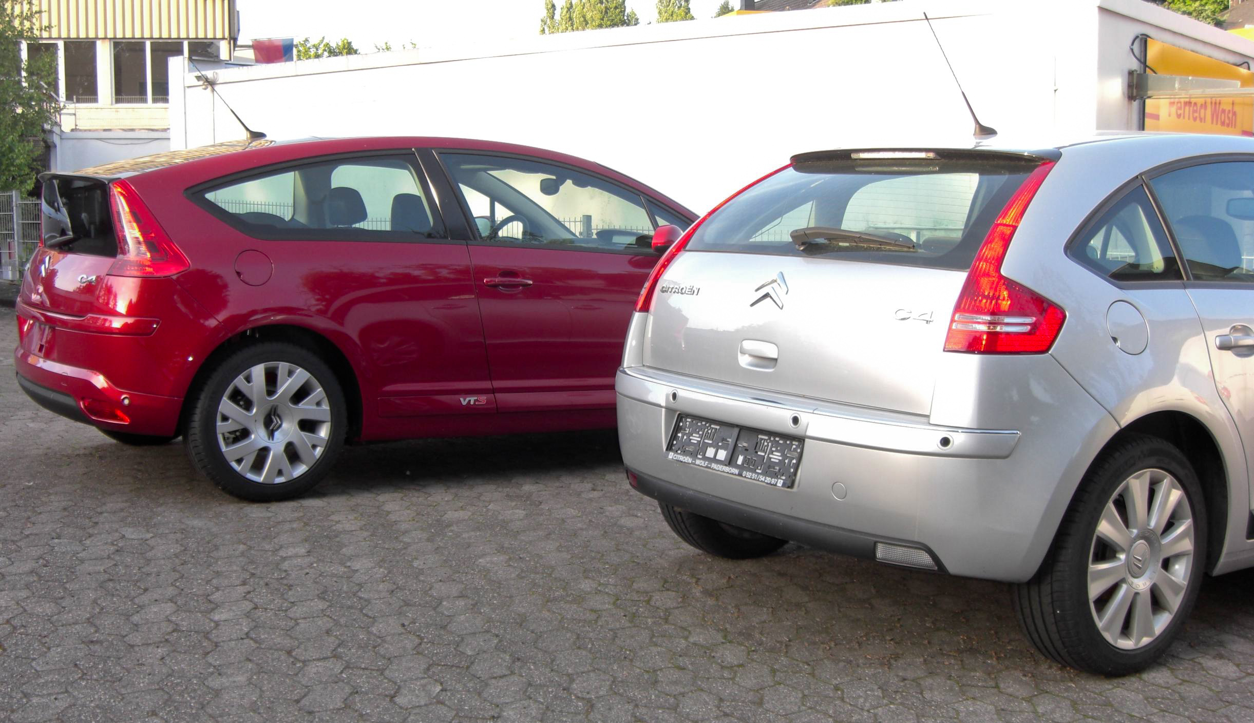 Citroen C4